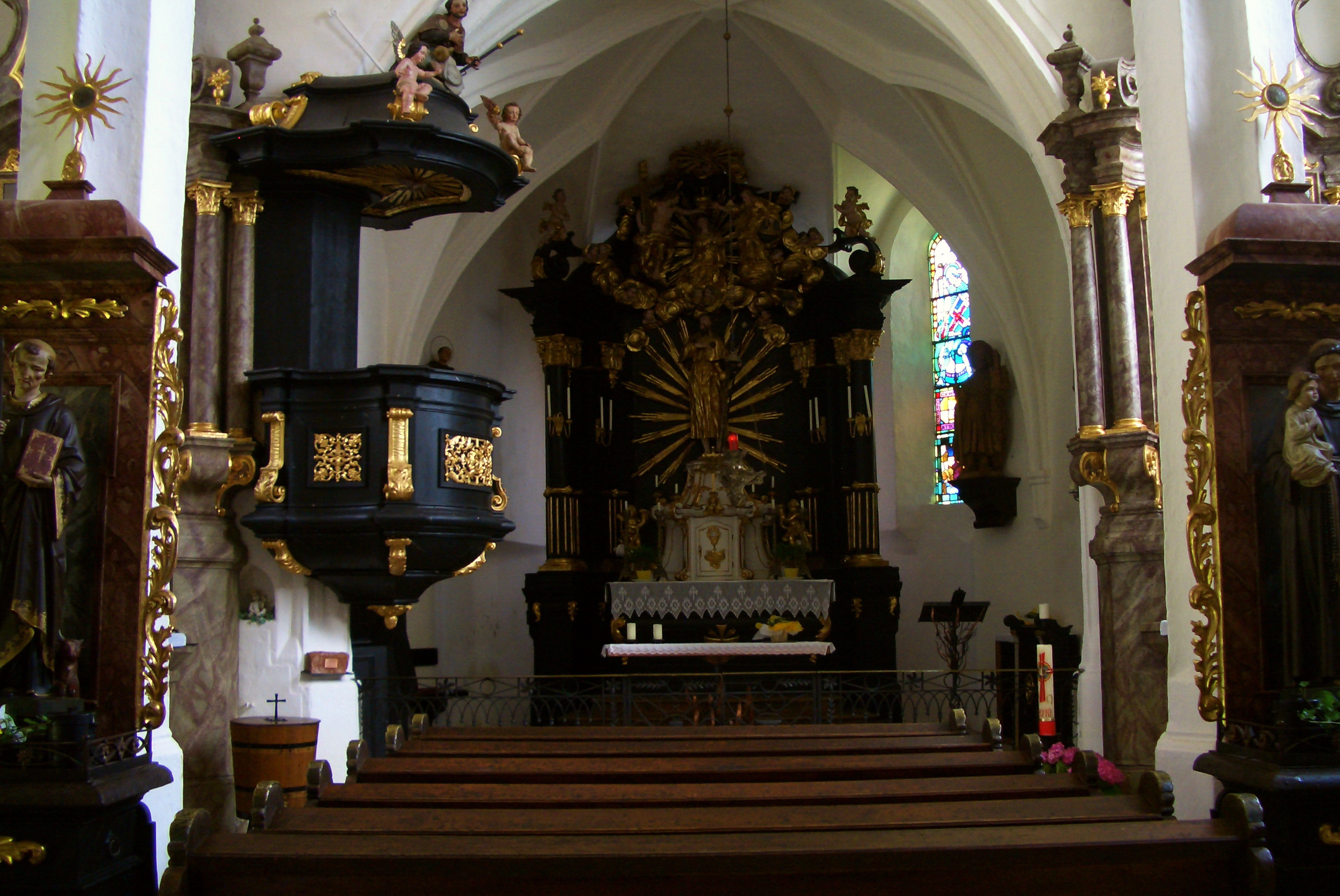 Kath. Filialkirche hl. Sebald Heiligenstein